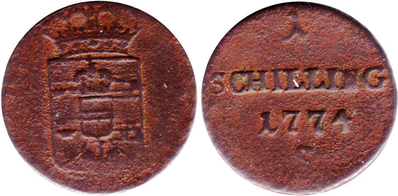 1 szelag 1774 KOZ